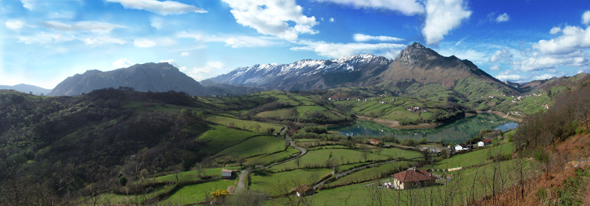 Ref.0202-Morcín